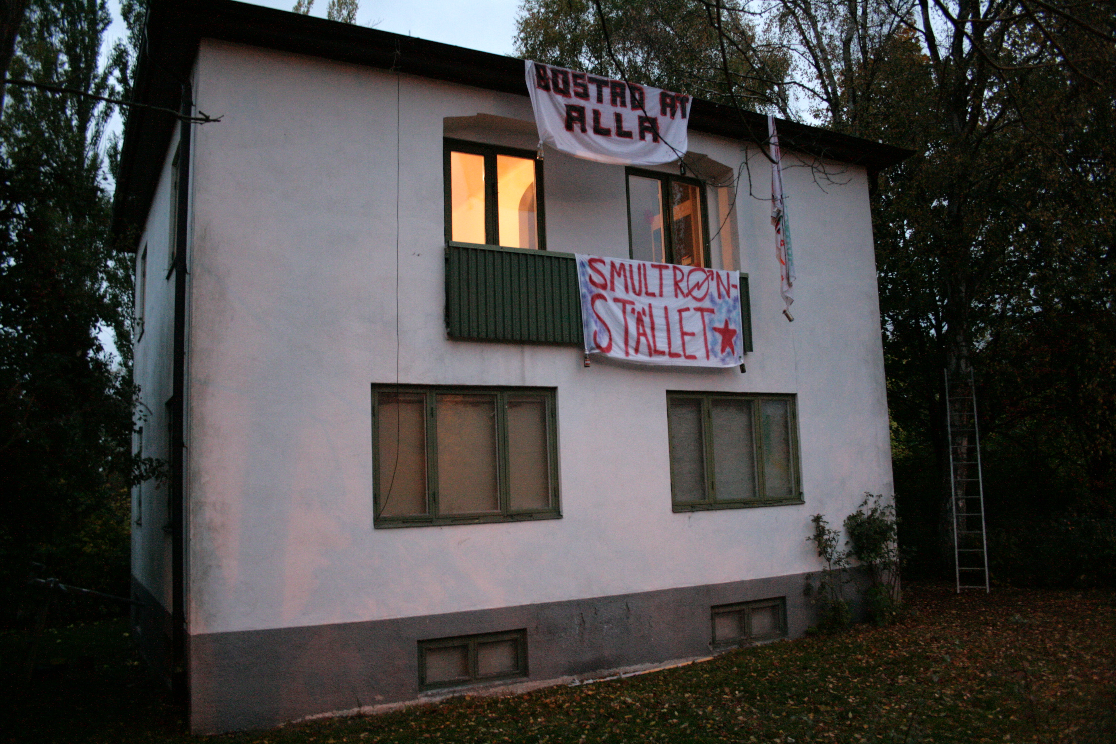 Ett ockuperat hus i Lund, kallat Smultronstället.